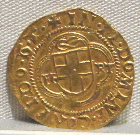 Palazzo Massimo alle Terme